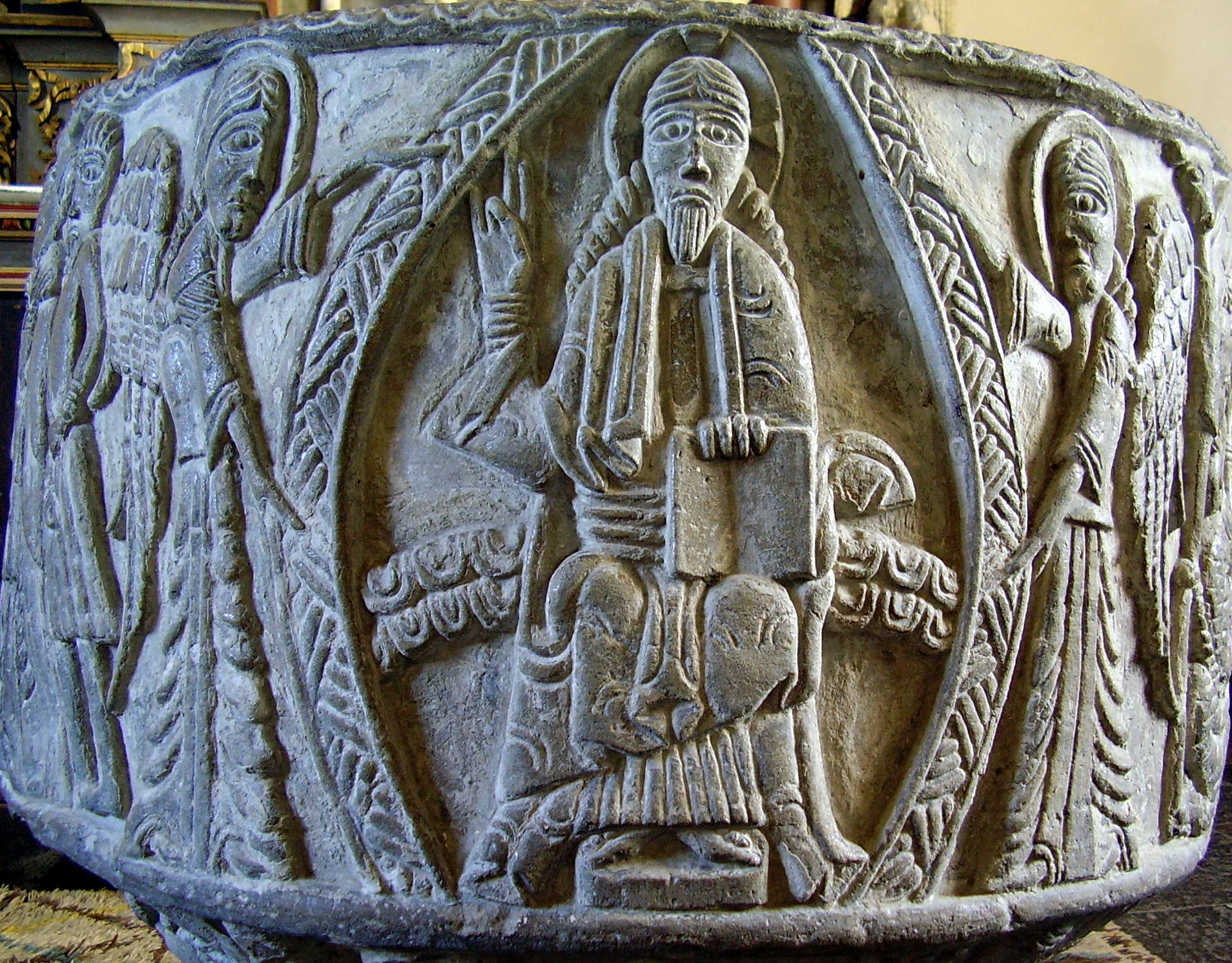 Majestas Domini-motiv på cuppan. Kristus sittande på en regnbåge inom en s.k. mandorla, som uppbärs av två änglar. Med höger hand genomför Kristus välsignelsegesten benedictio latina, och i den vänstra handen håller han livets bok.